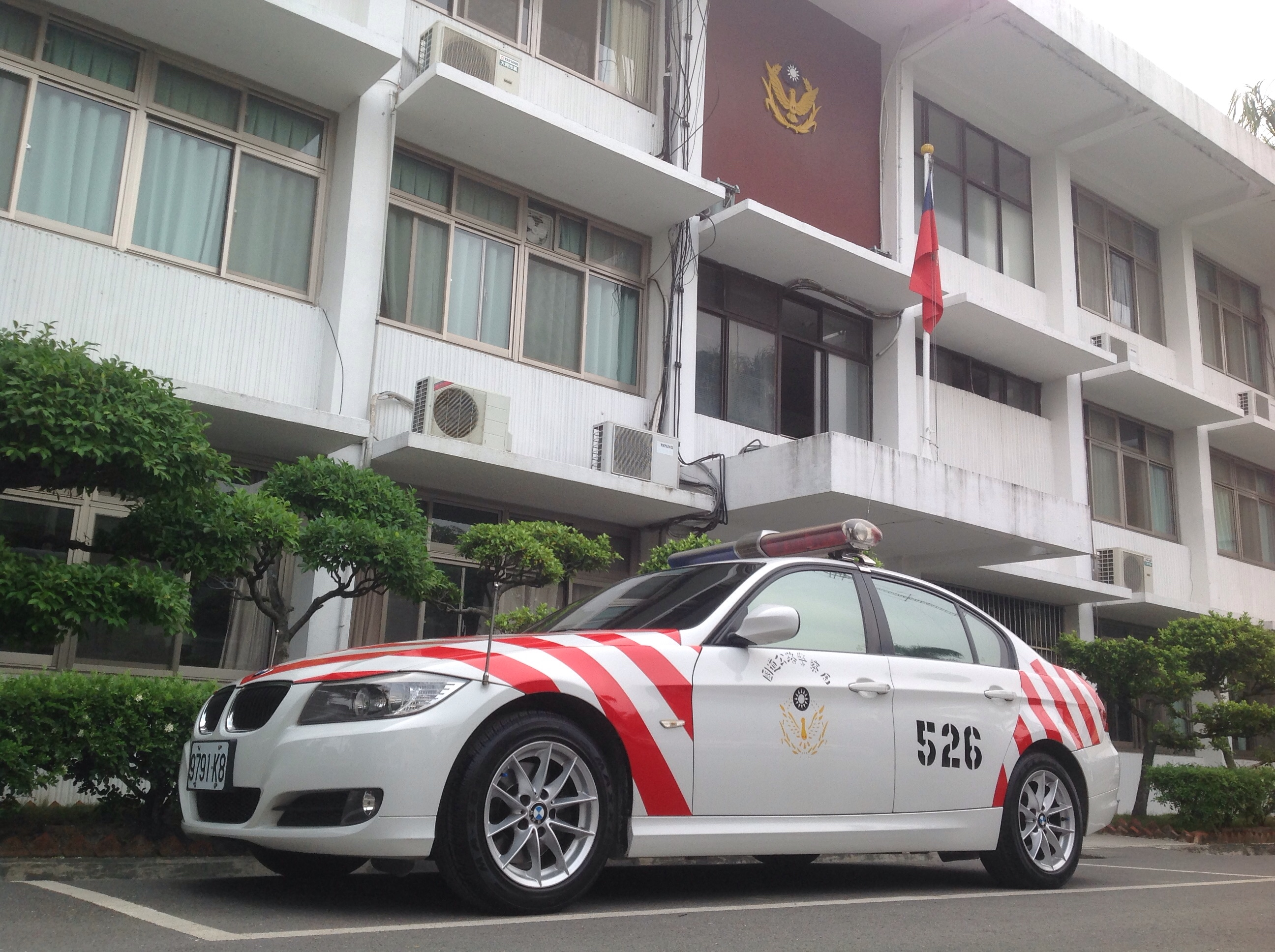 中文（台灣）: 內政部警政署國道公路警察局第五警察大隊岡山分隊BMW 3 Series E90 320i 6MT巡邏車9791-K8。